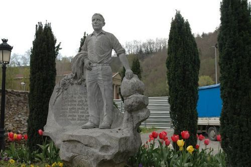 Lazkao Txiki bertsolariaren omenezko irudia Lazkao bere sorterrian.